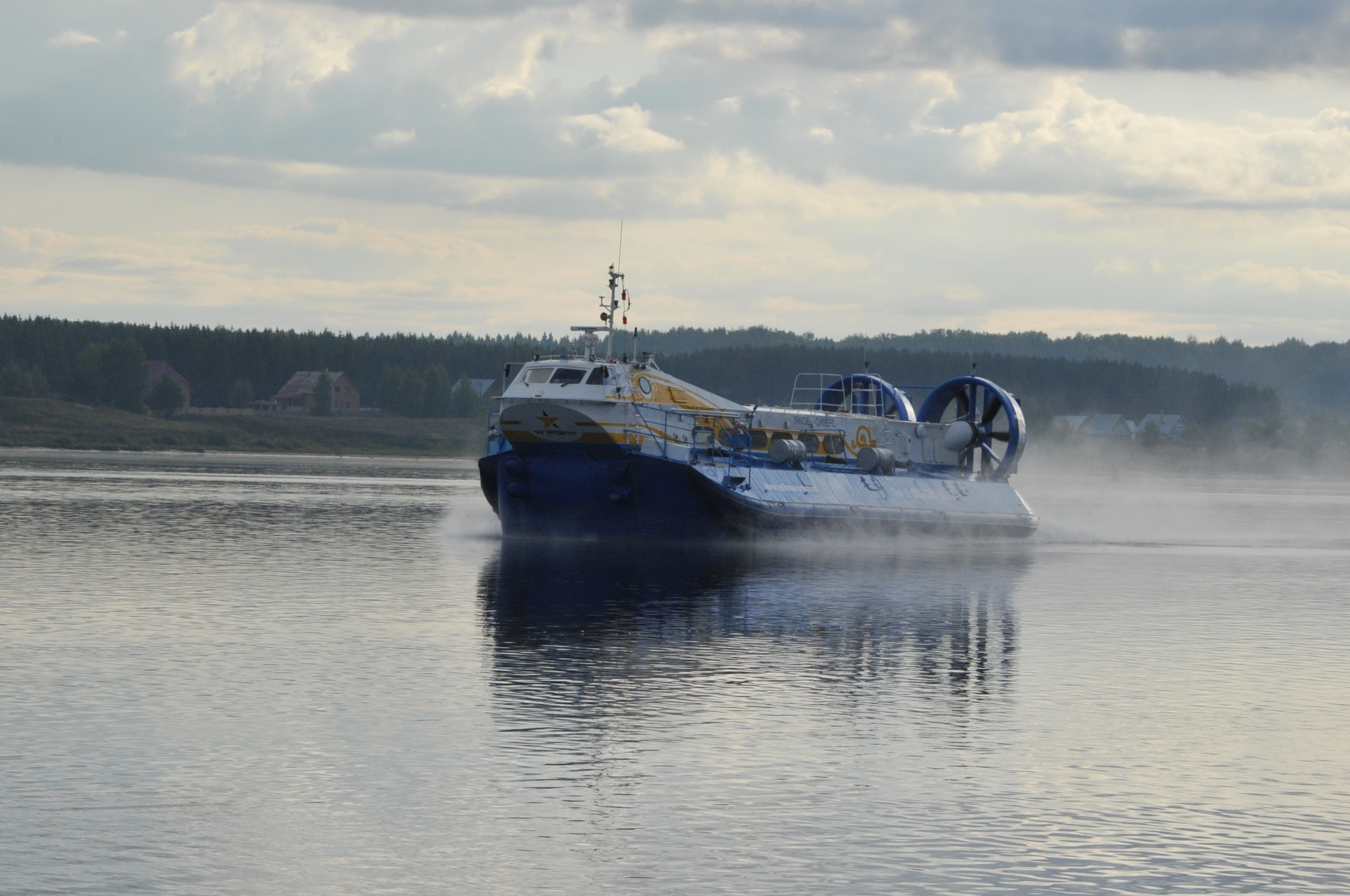 СВП А48 вечером